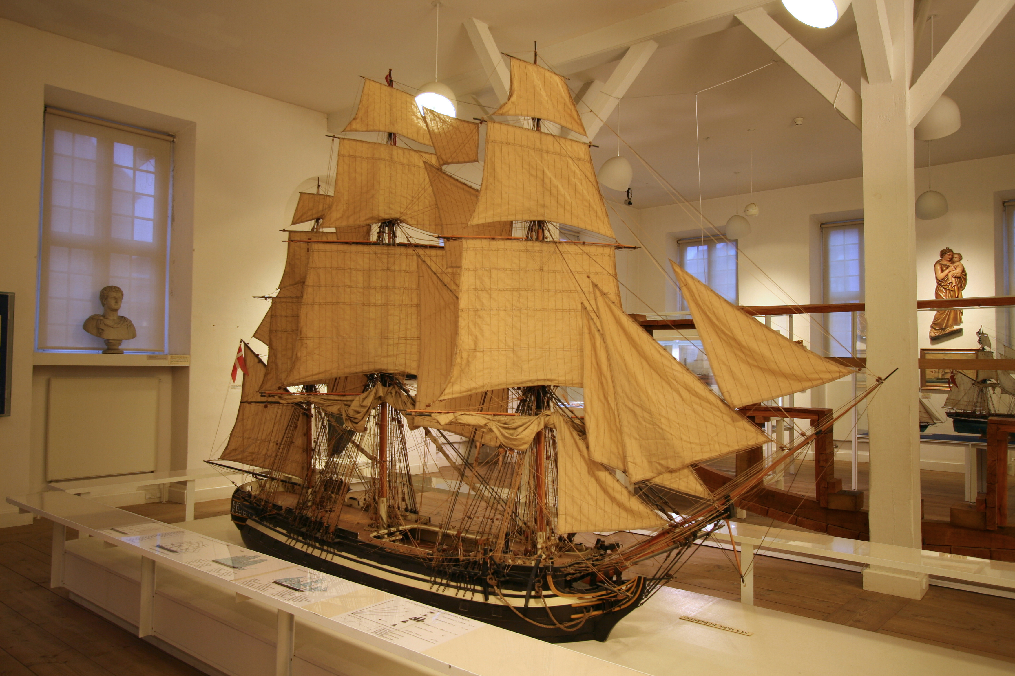 Orlogsmuseet, The Royal Danish Naval Museum in Copenhagen. Phoenix. The first ship built after the English robbed the fleet. Model af det første skib, der blev bygget efter flådens ran.